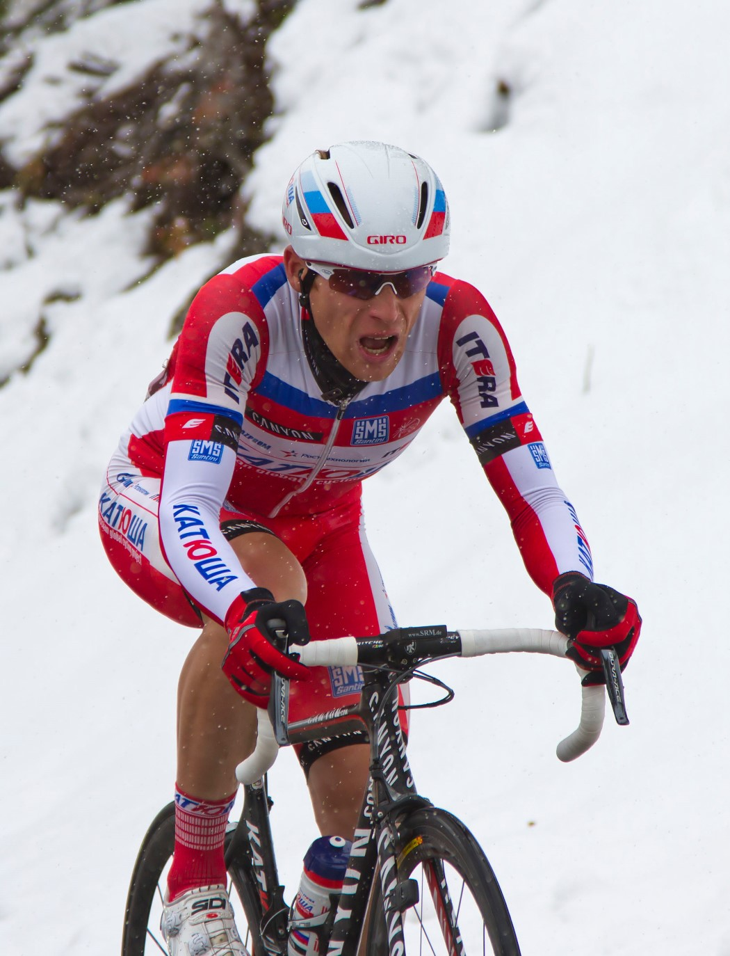 032 pavel brutt